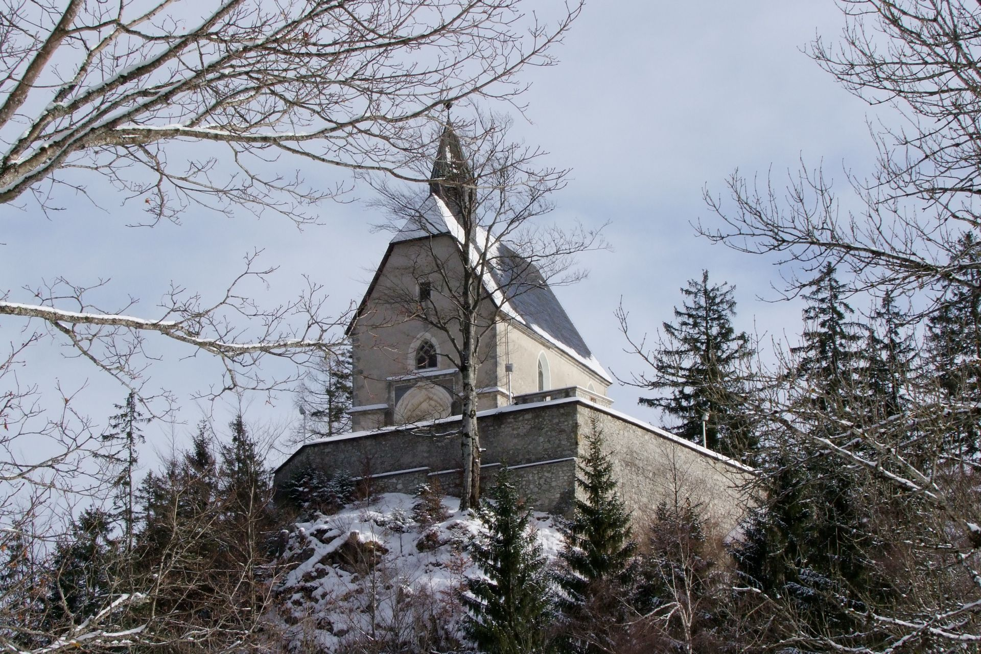 Kath. Filialkirche hl. Sigmund am Sigmundsberg 1 in der früheren Gemeinde Sankt Sebastian, seit 2015 Mariazell.